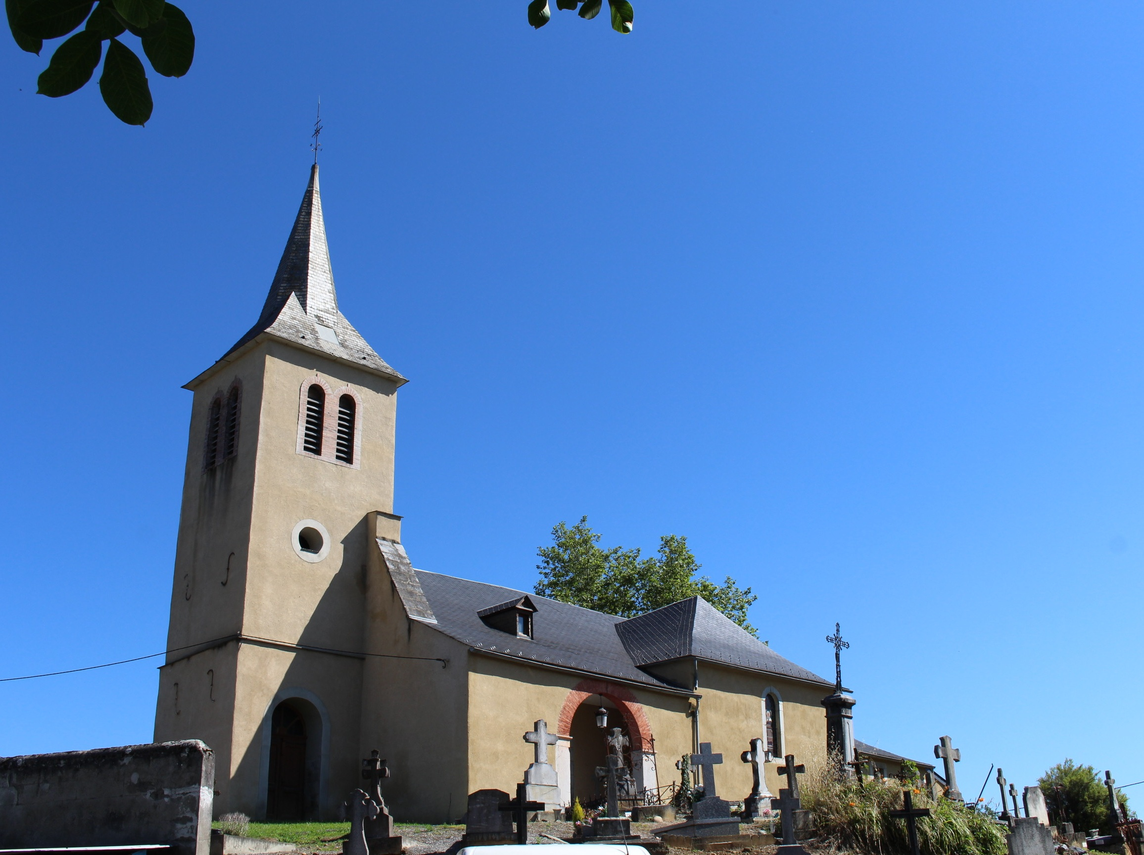 Église de l'Assomption de Tilhouse (Hautes-Pyrénées)